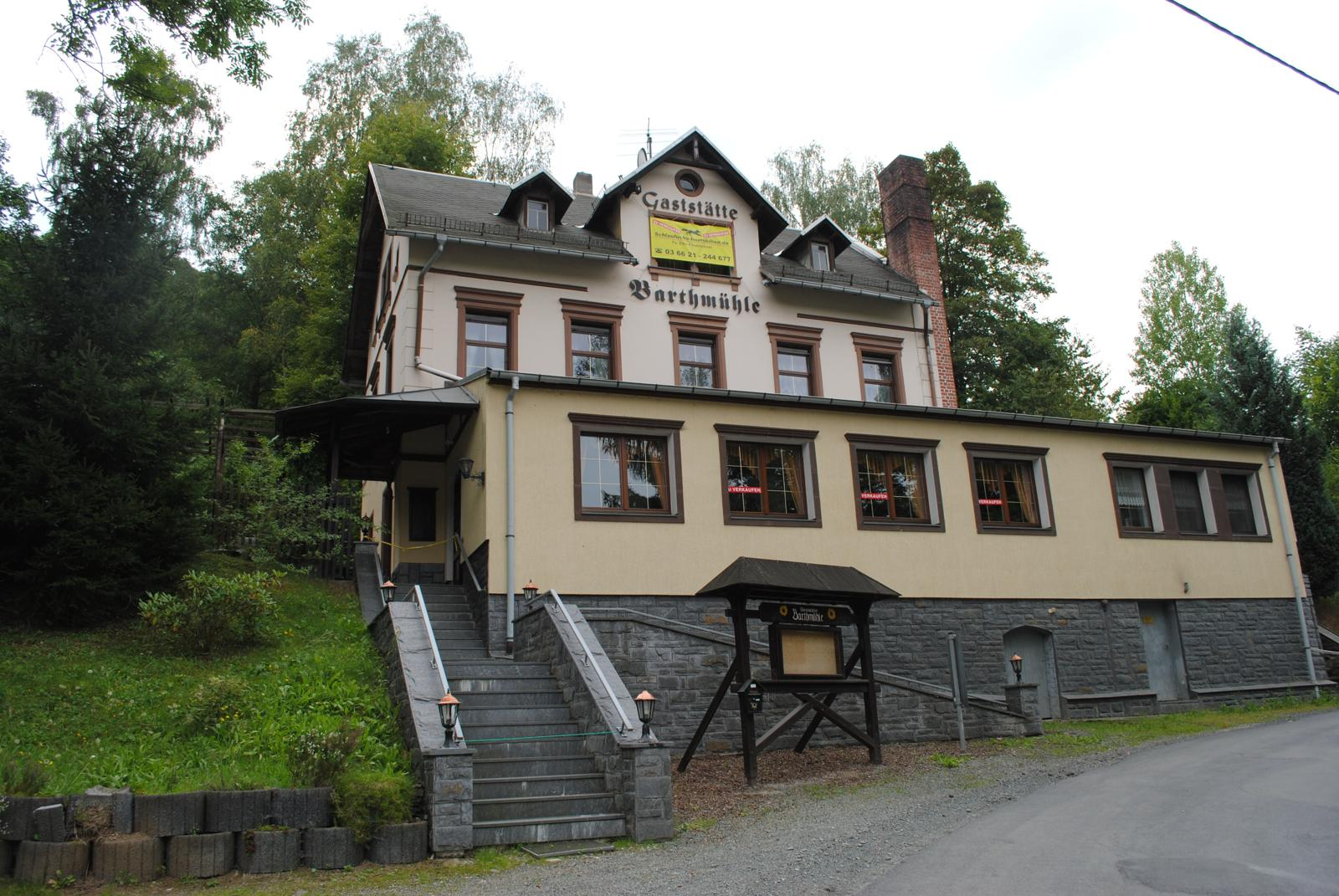 Ausflugslokal Barthmühle im Ortsteil Barthmühle der Gemeinde Pöhl, seit 2011 geschlossen